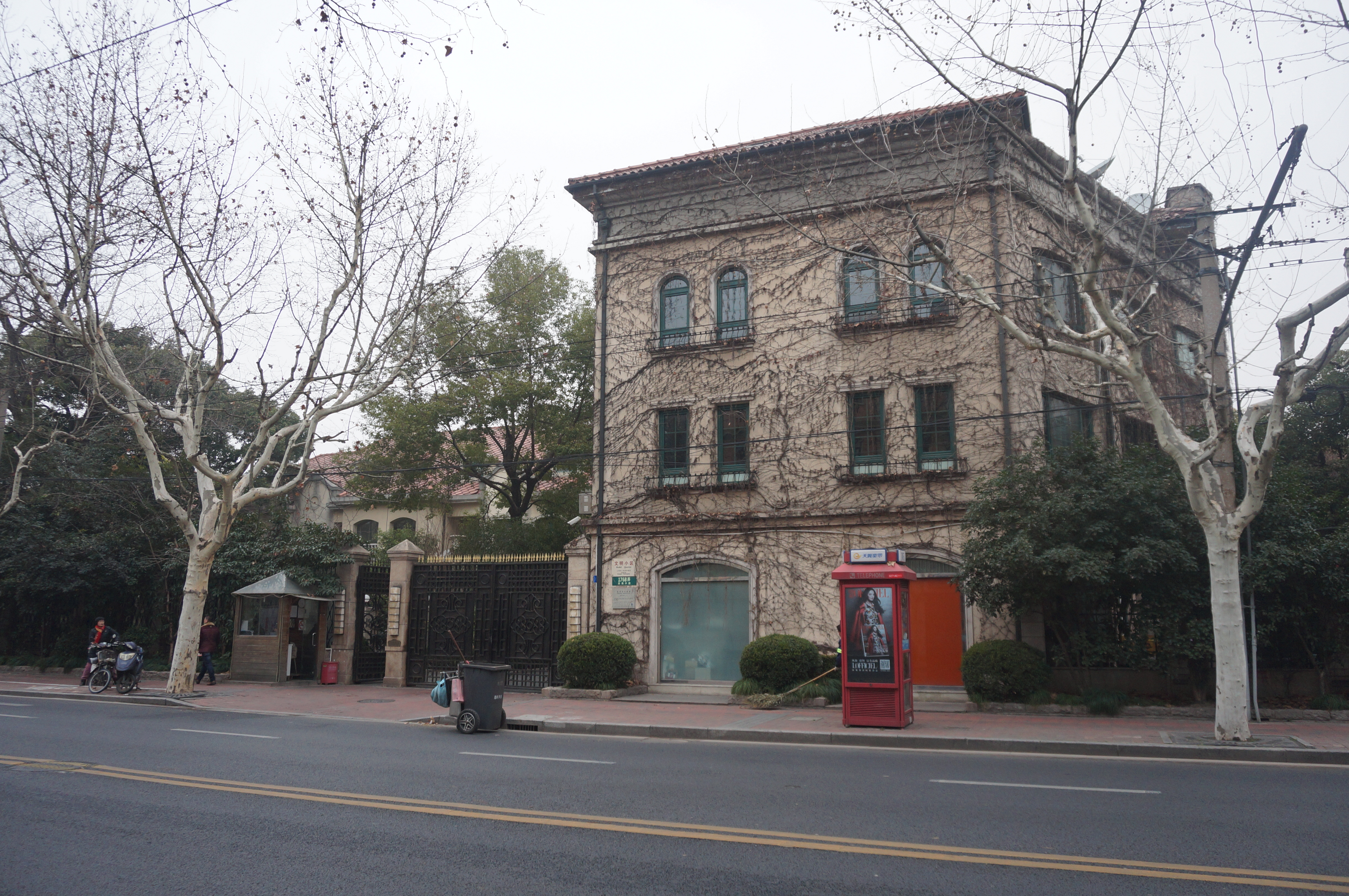 中文（中国大陆）: 上海原霞飞别墅